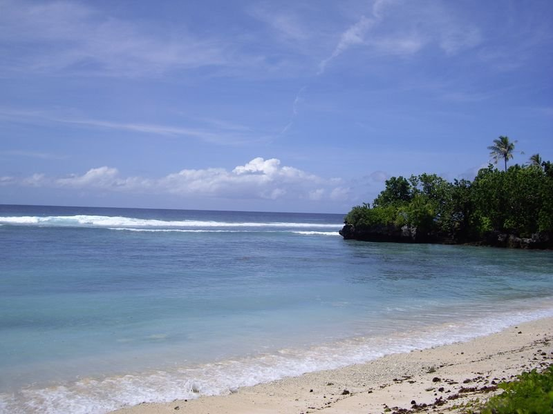 Guam beach